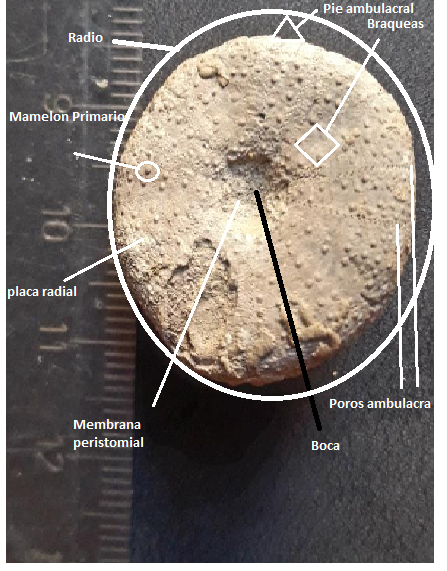 Holectipus panatus de la Formación Agrio. se observa la simetría del erizo, un caparazón sin púas.